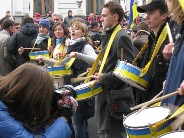 Активісти «Відсічі» під час «Податкового майдану»: Own work